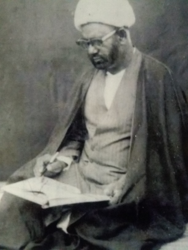 دار العلوم محمدیہ سرگودھا